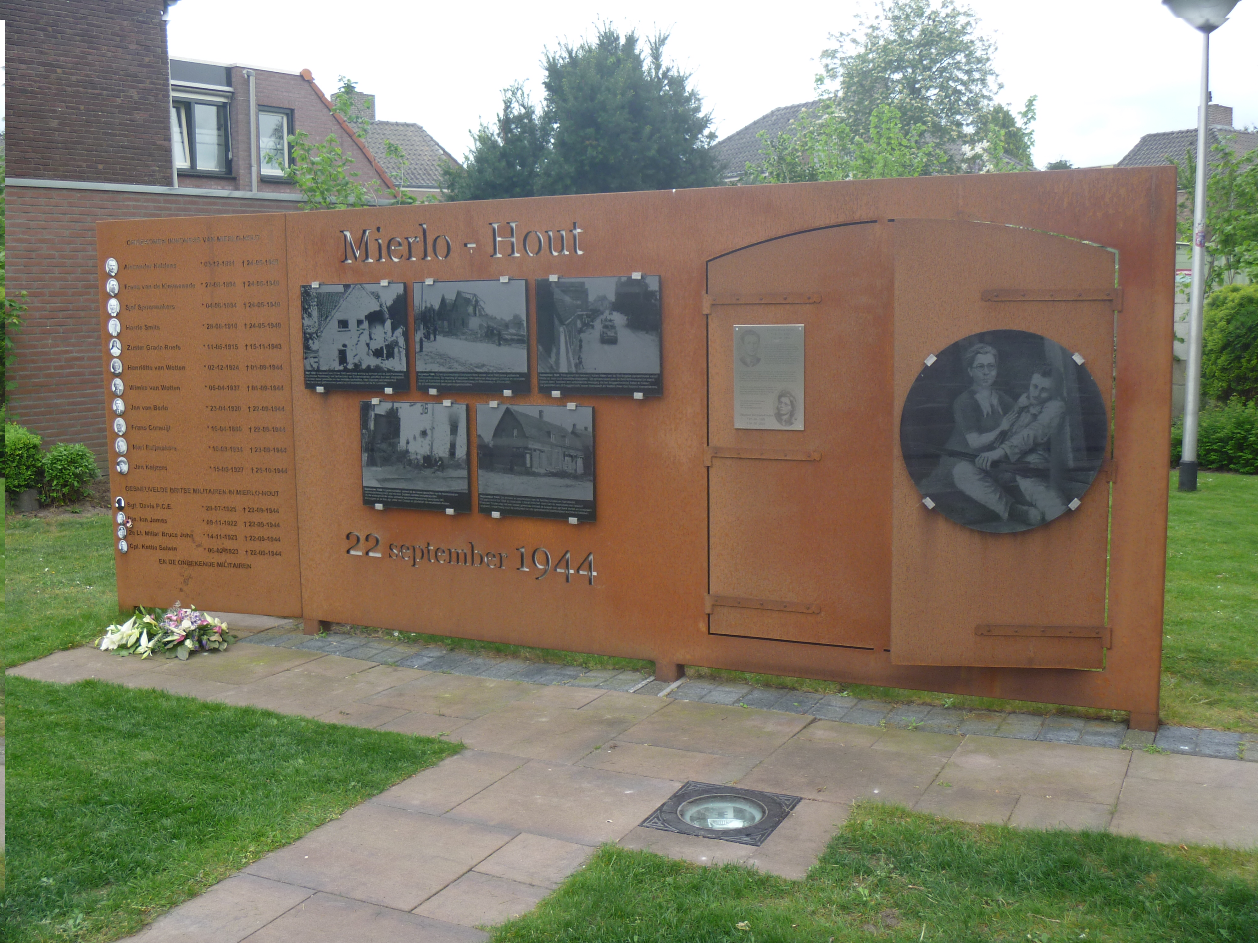 Omgekomen inwoners Mierlo-Hout Gesneuvelde Britse militairen in Mierlo-Hout en de Onbekende Militairen